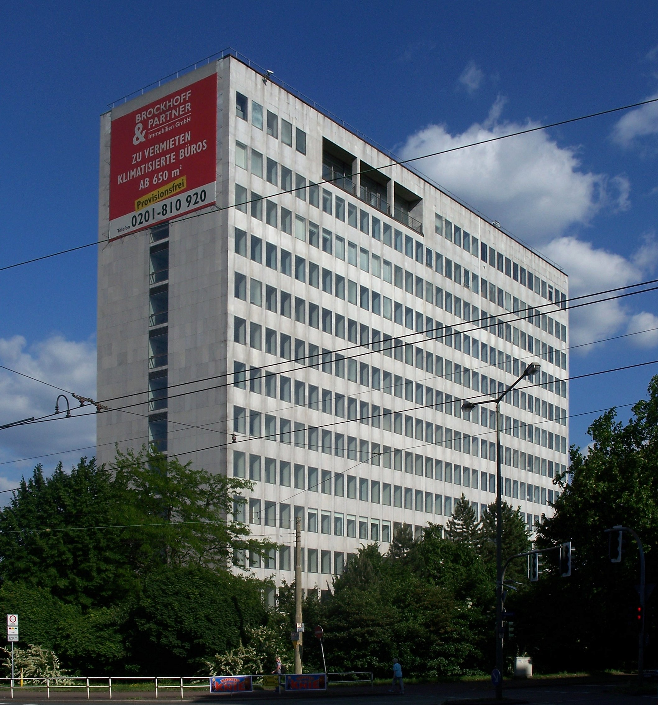 Leerstehendes Verwaltungsgebäude des Bochumer Vereins an der Kreuzung Alleestaße/Kohlenstraße in Bochum. Bauzeit: 1961-1964, Architekt: Wilhelm Seidensticker, Essen